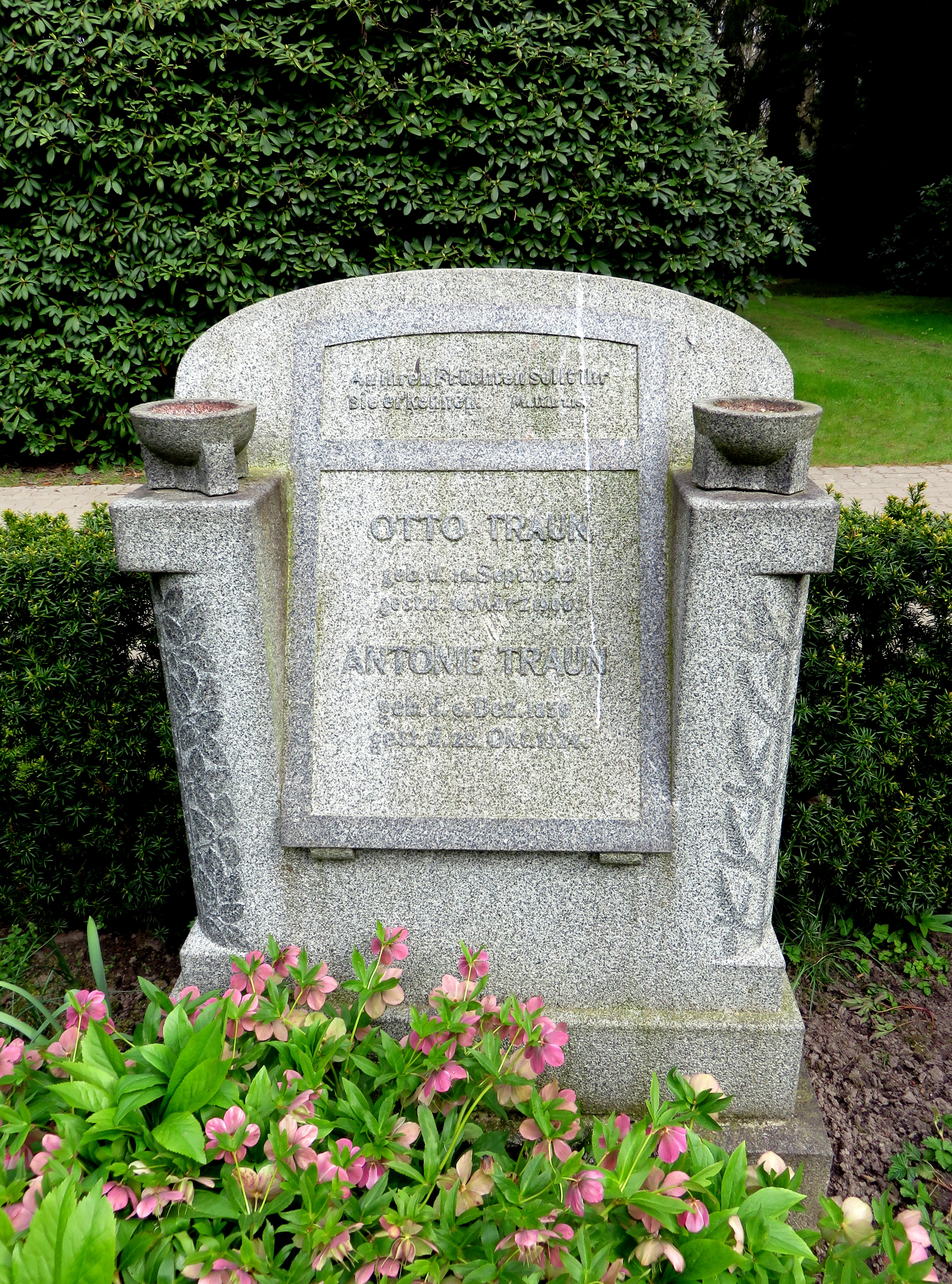 Historischer Grabstein der deutschen Sozialreformerin Antonie Wilhelmine Traun im Bereich des Gartens der Frauen auf dem Ohlsdorfer Friedhof in Hamburg-Ohlsdorf.